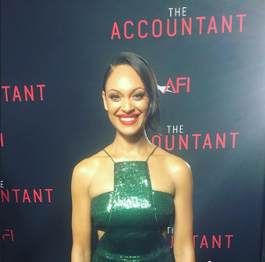 Cynthia Addai-Robinson à l'avant-première de Mr. Wolff à Entertainment Weekly